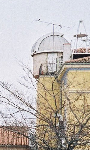 Visnjan Observatroy